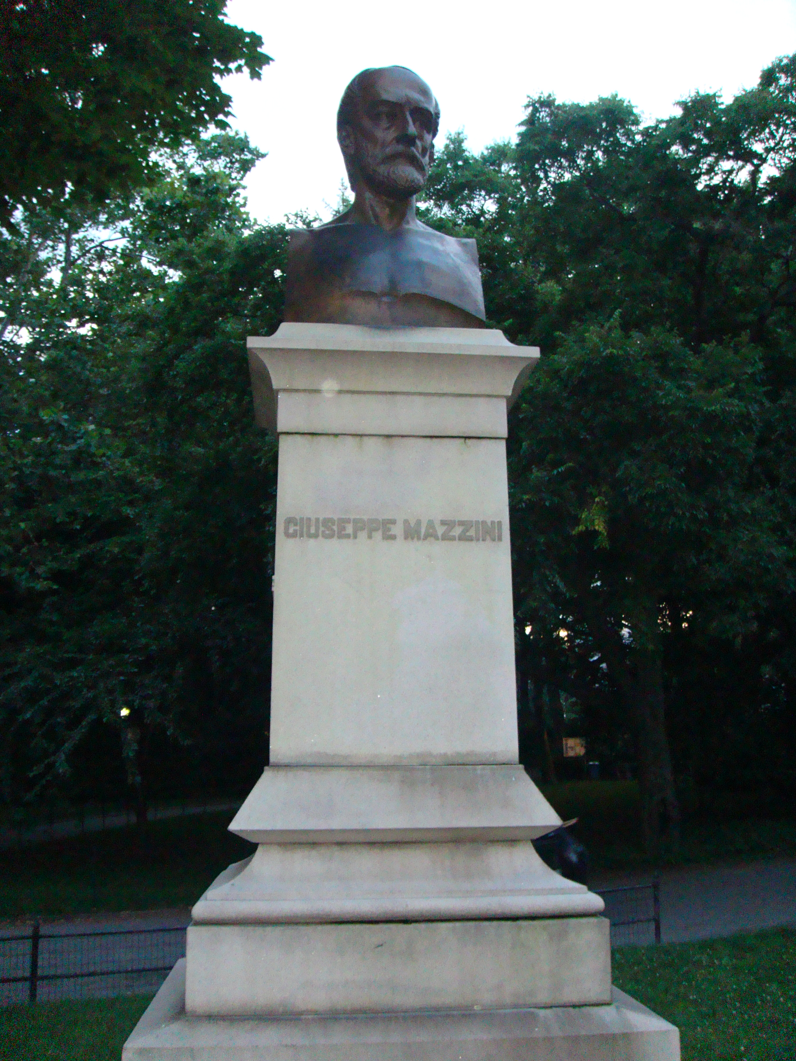 Giuseppe Mazzini